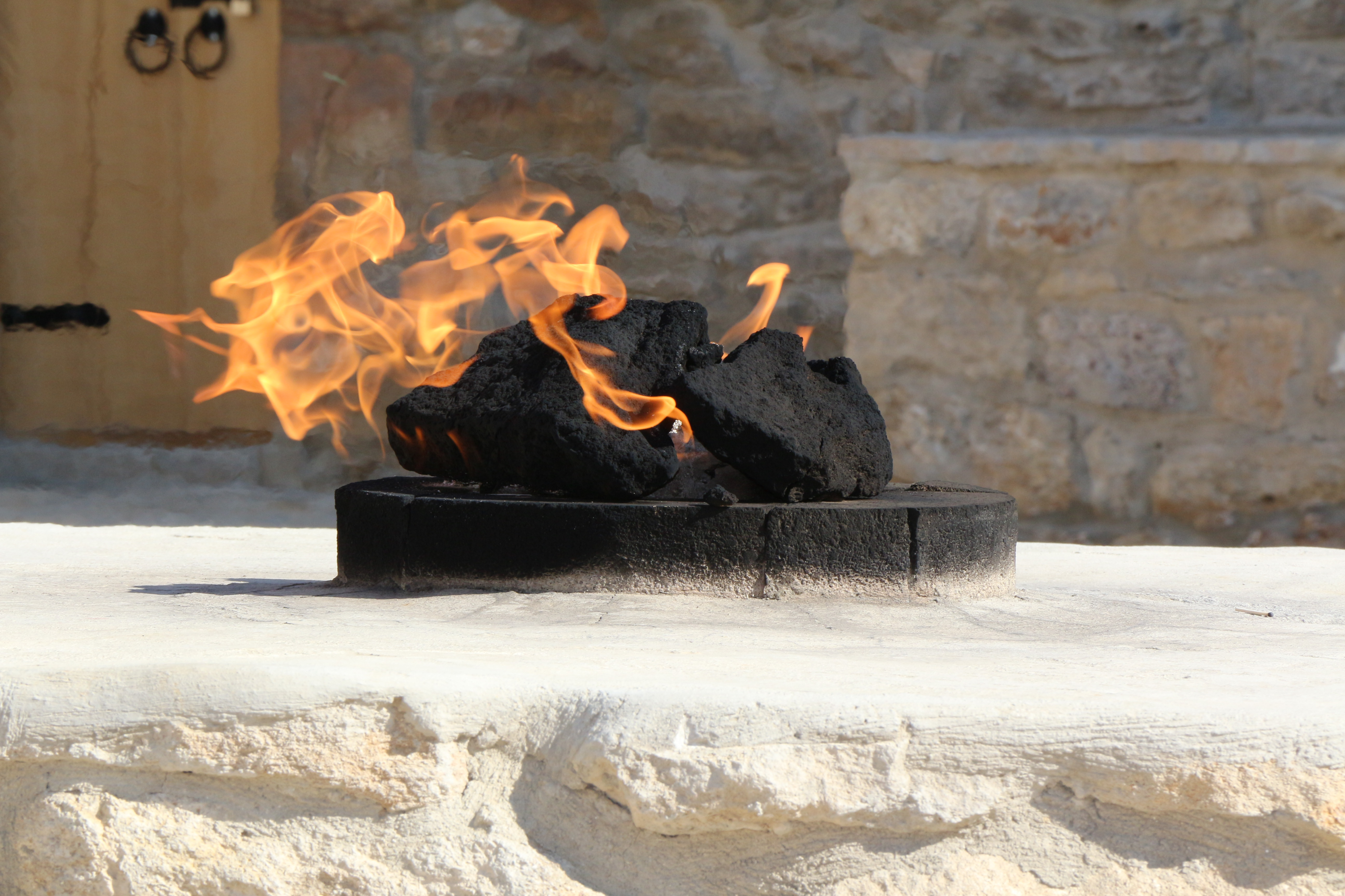 Храм огнепоклонников "Атешгях"